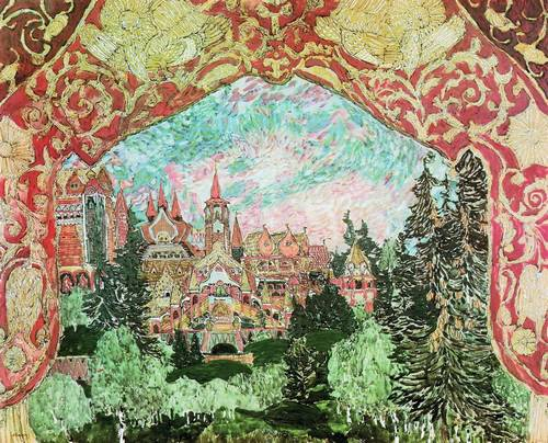 Терема. 1903 Эскиз декораций к балету А.Н. Корещенко "Волшебное зеркало" Государственная Третьяковская галерея